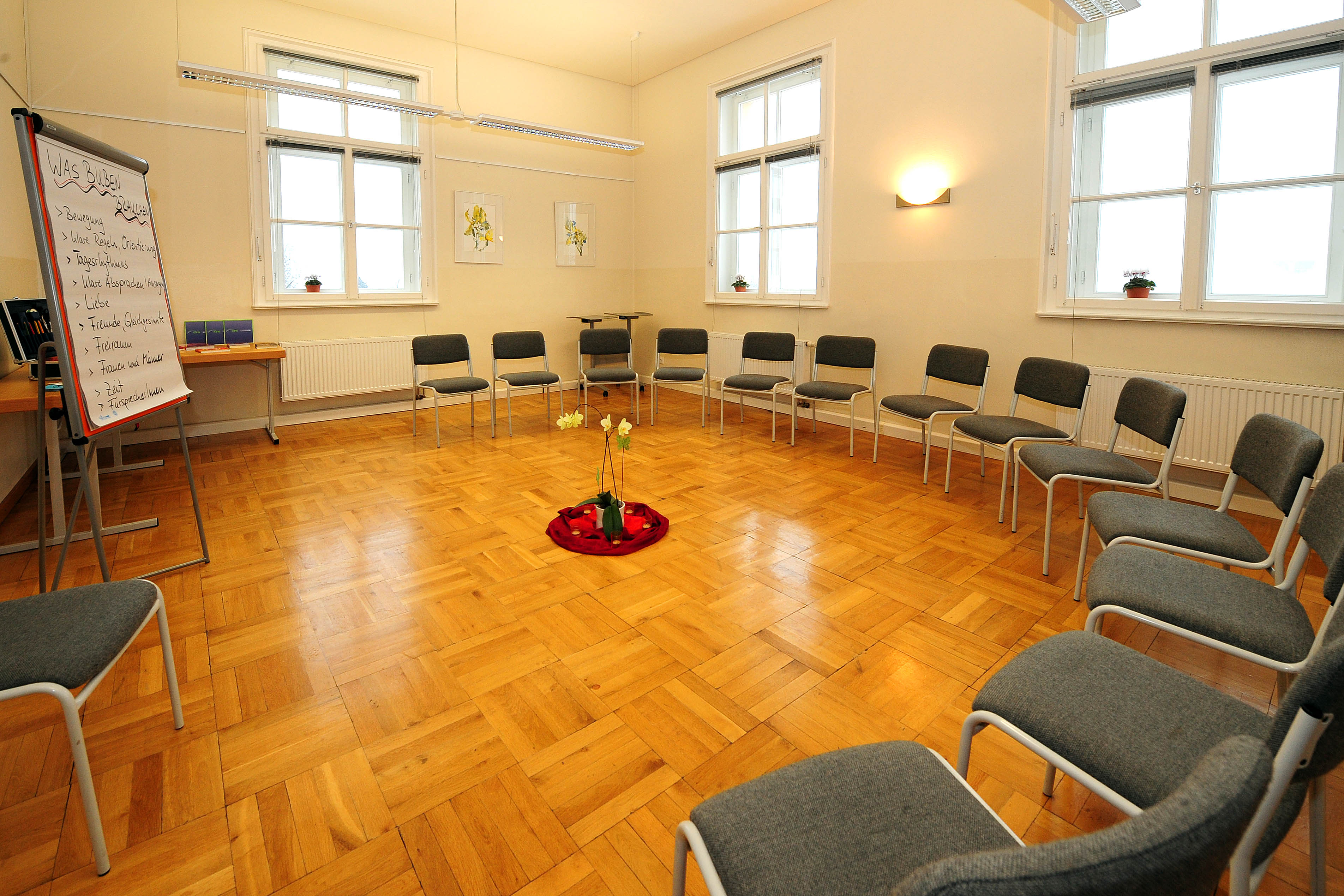 Ein Kursraum des KBW